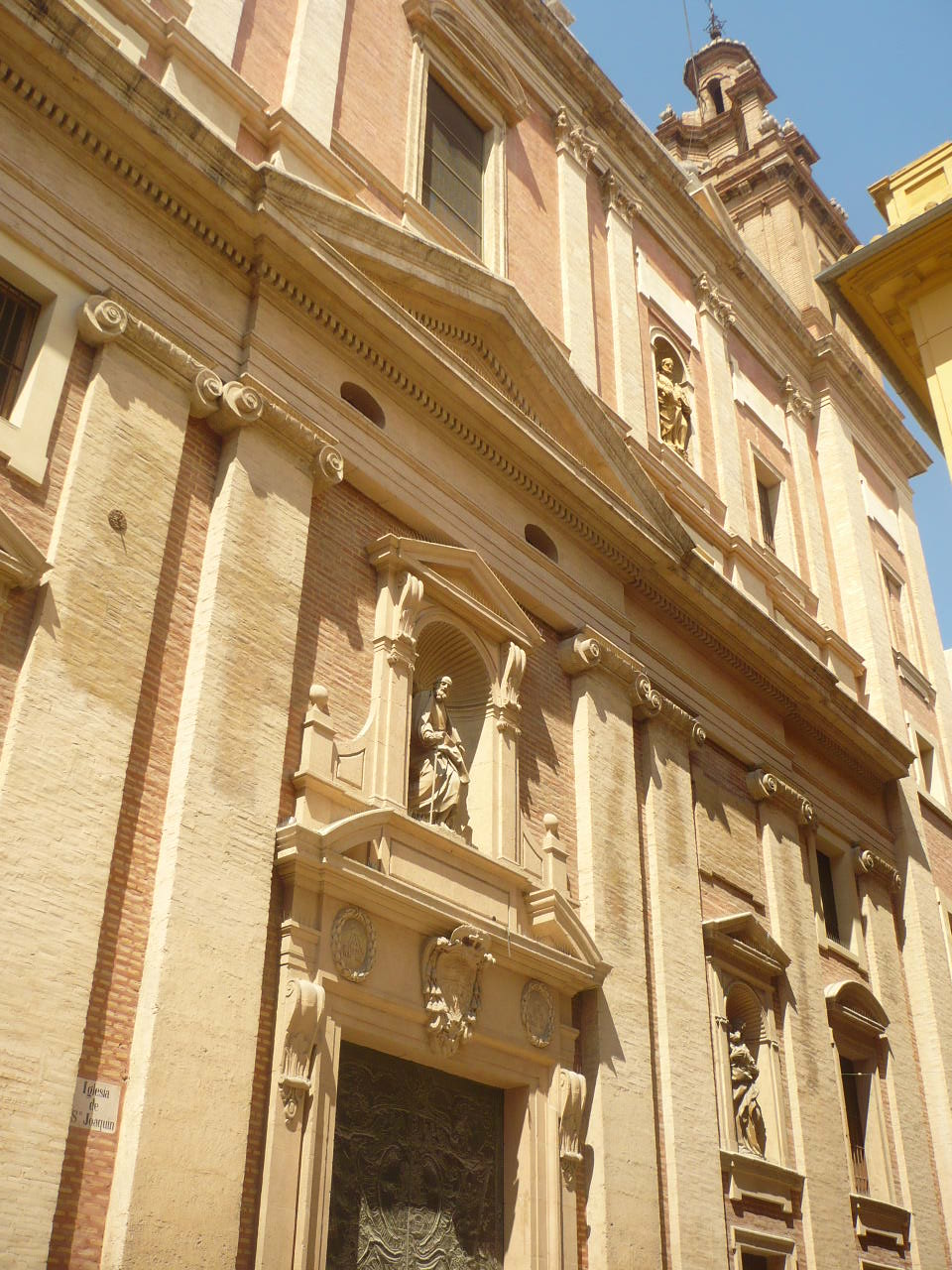 Vista de la Fachada principal de la Iglesia de los escolapios de la Calle carniceros de Valencia.